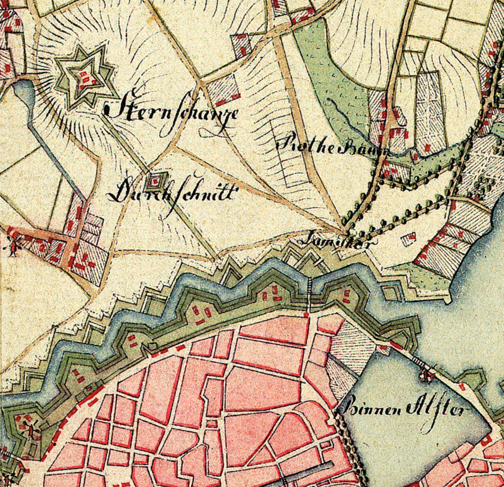 Ausschnitt Sternschanze aus aus_varendorf(62)Altona_Hamburg_Harburg.jpg. Aufgenommen in den Jahren 1789 bis 1796 unter der Direktion des Majors Gustav Adolf von Varendorf durch Offiziere des Schleswigschen Infanterieregiments